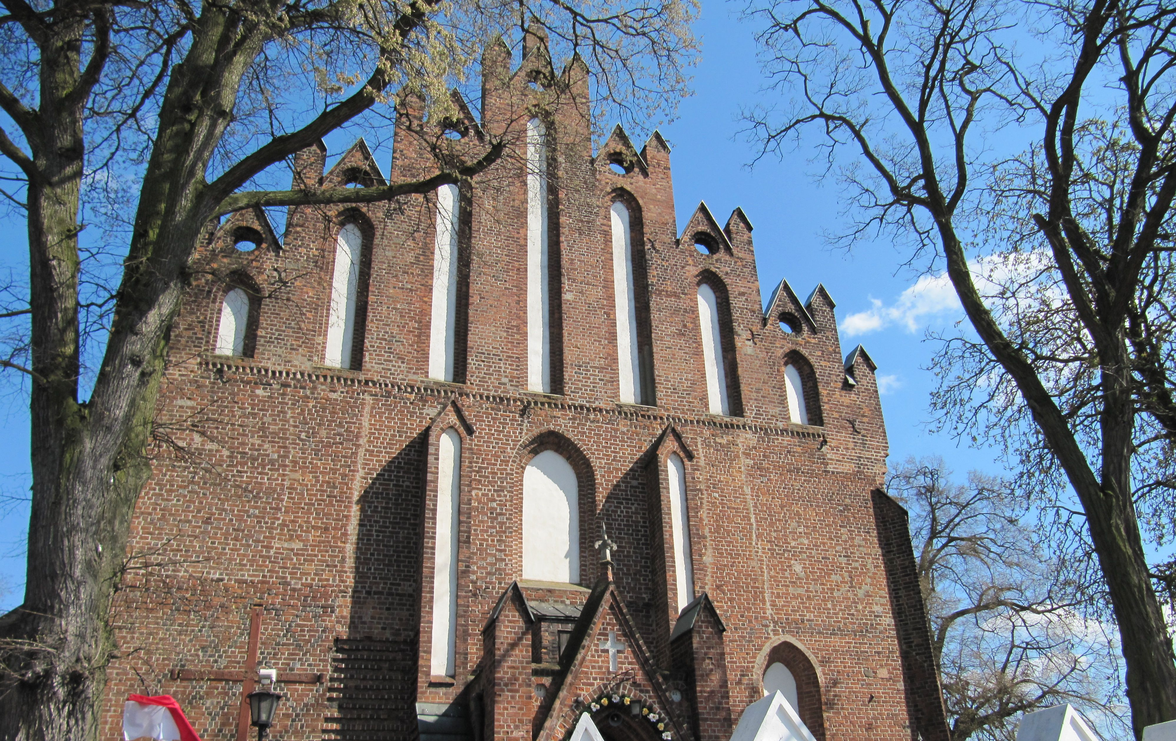 Szadek, ul. Ogrodowa 1 - kościół parafialny pw. Wniebowzięcia NMP i św. Jakuba Apostoła (1333-1335, XIX w.)